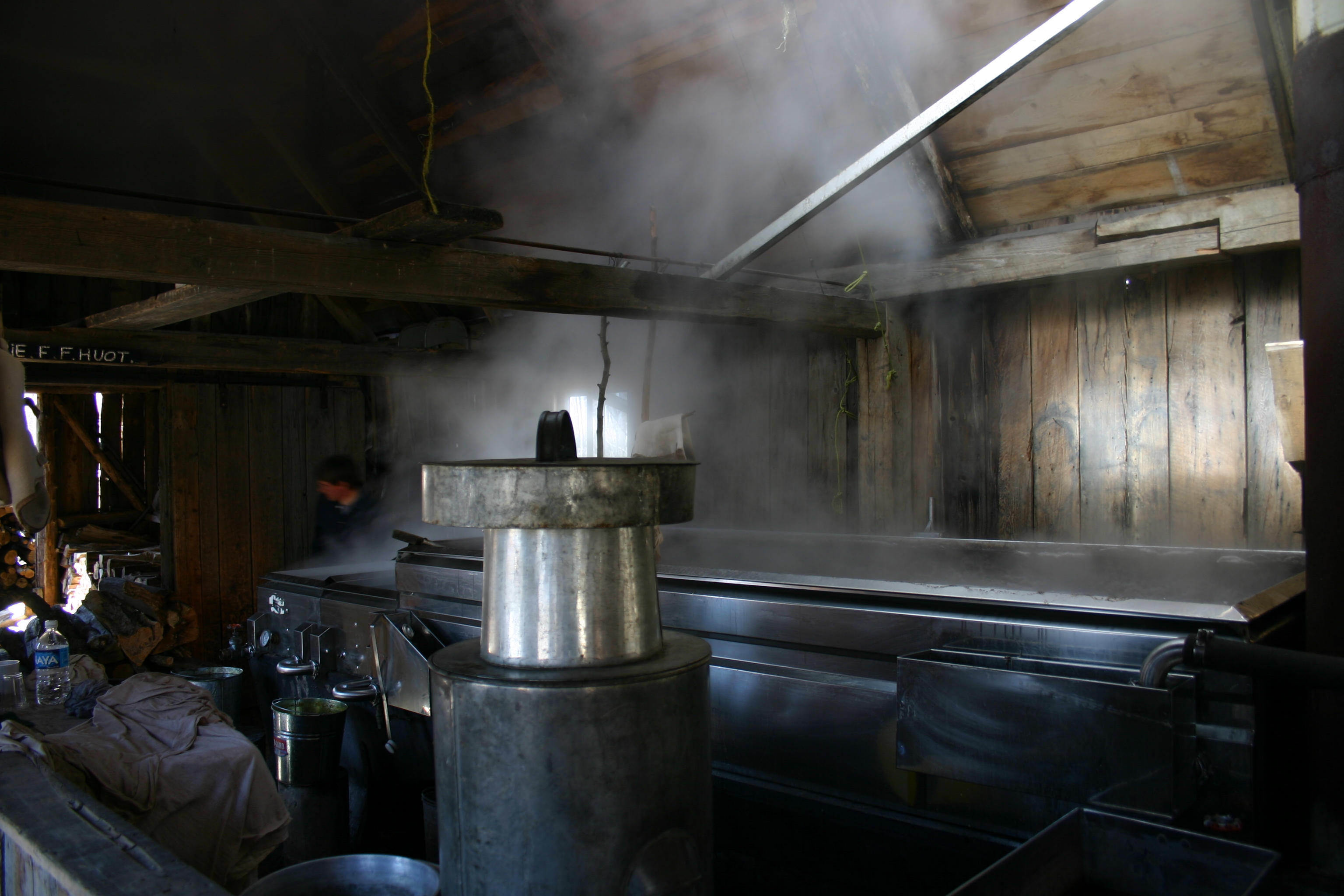 fabrication du sirop d'érable dans une cabane à sucre au Québec